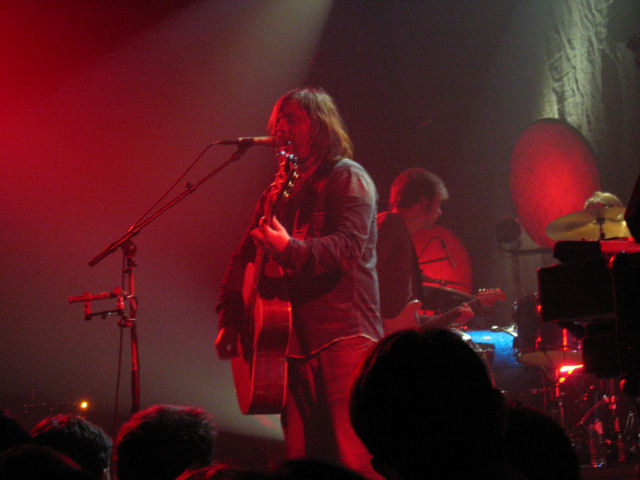 Saybia in concert